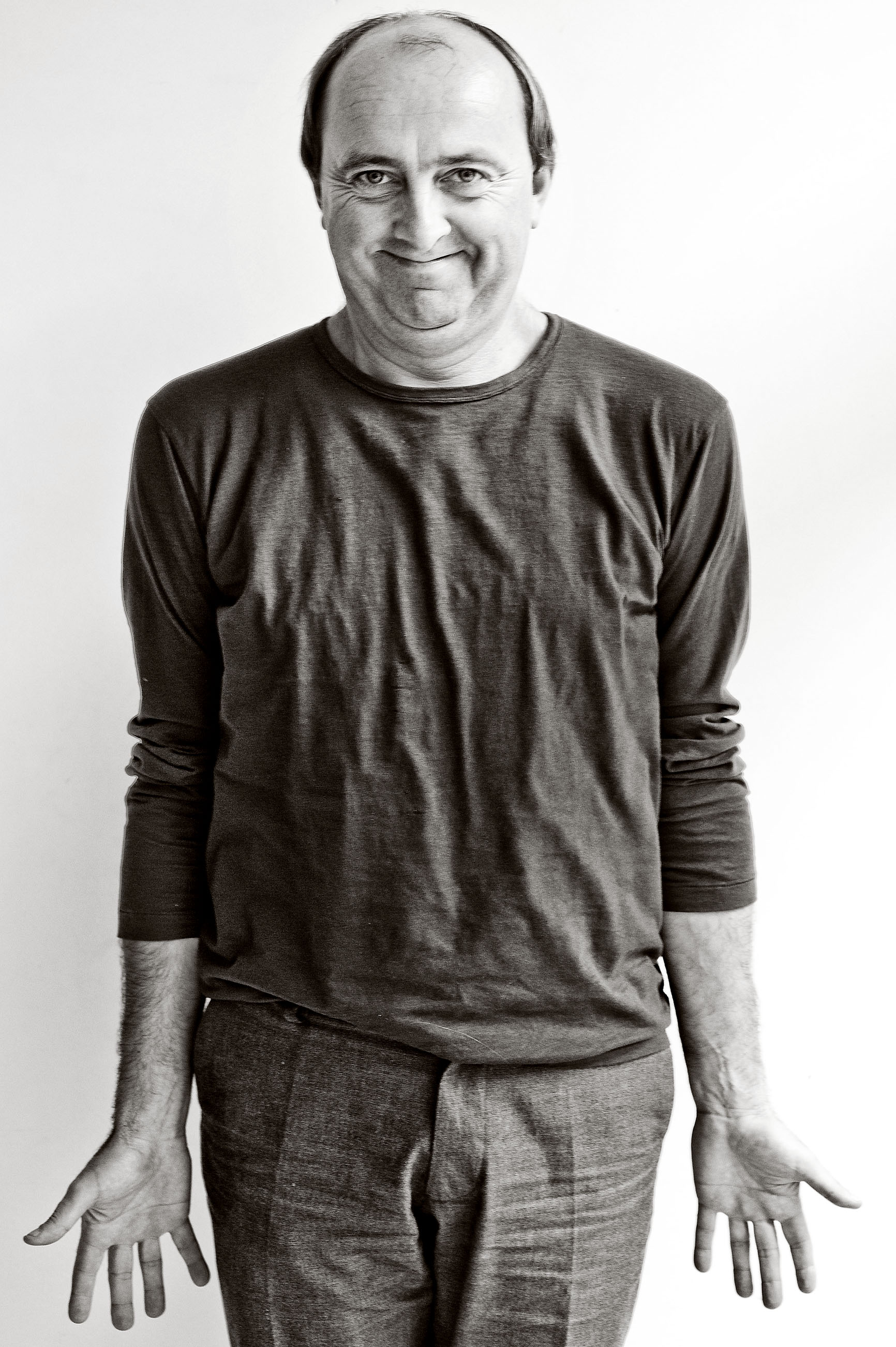 Arne Sierens, Vlaams schrijver en theatermaker.